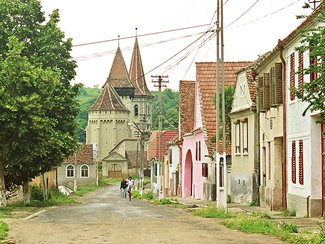 Kleinschelken mit Kirche